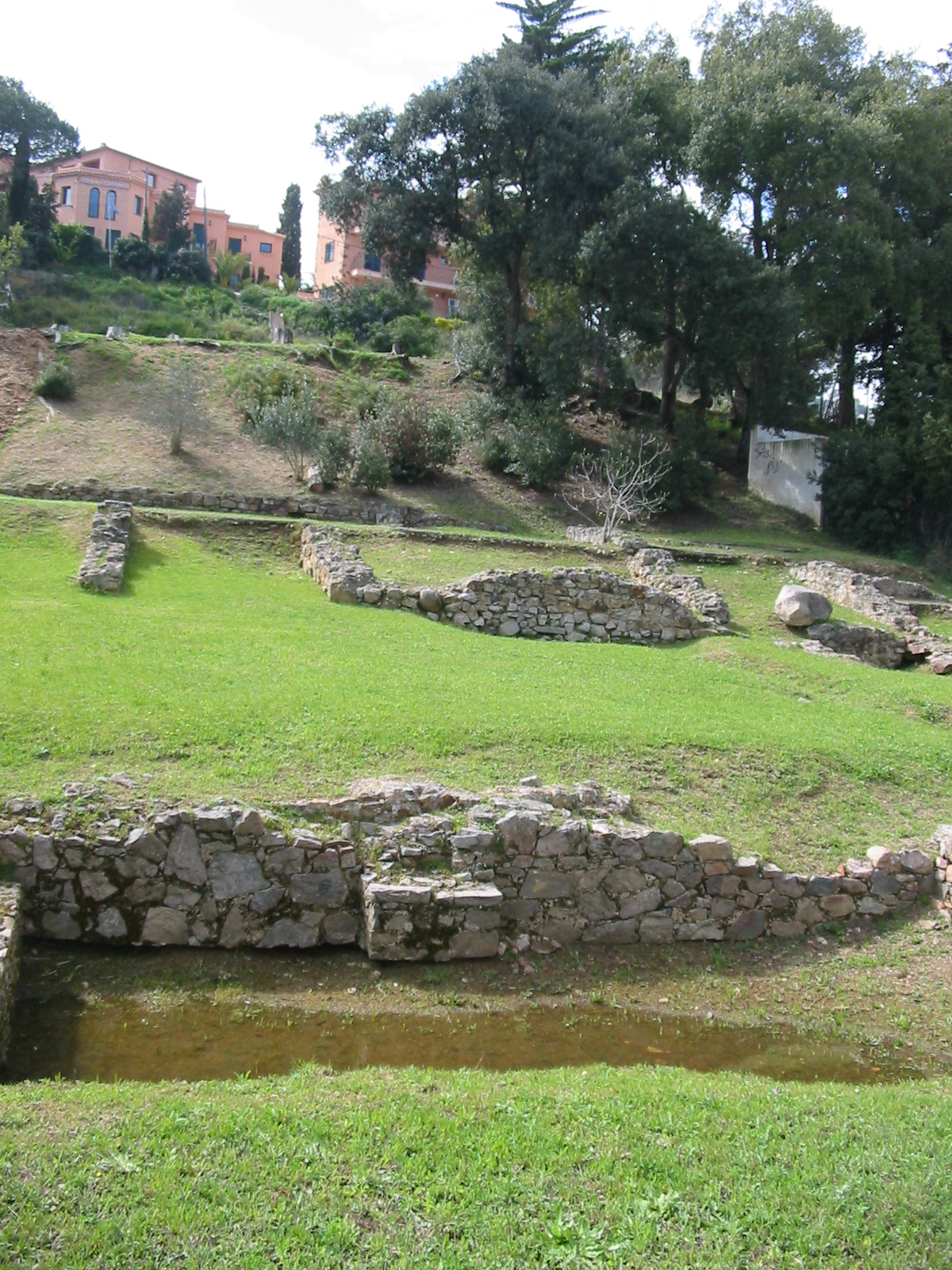 Tossa de Mar, Costa Brava, Catalonia: Roman excavations